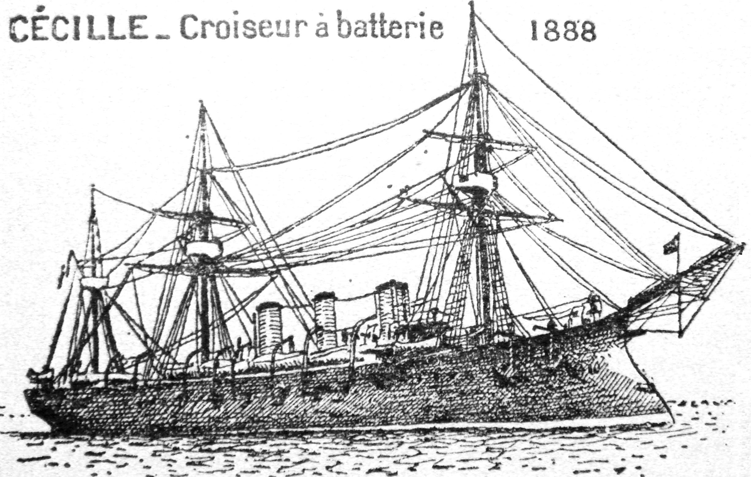 Croiseur protégé Amiral Cécille_1888